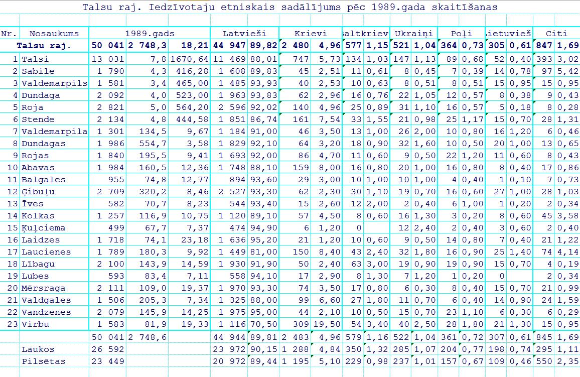 Этнический состав населения Латвии по переписи 1989 года